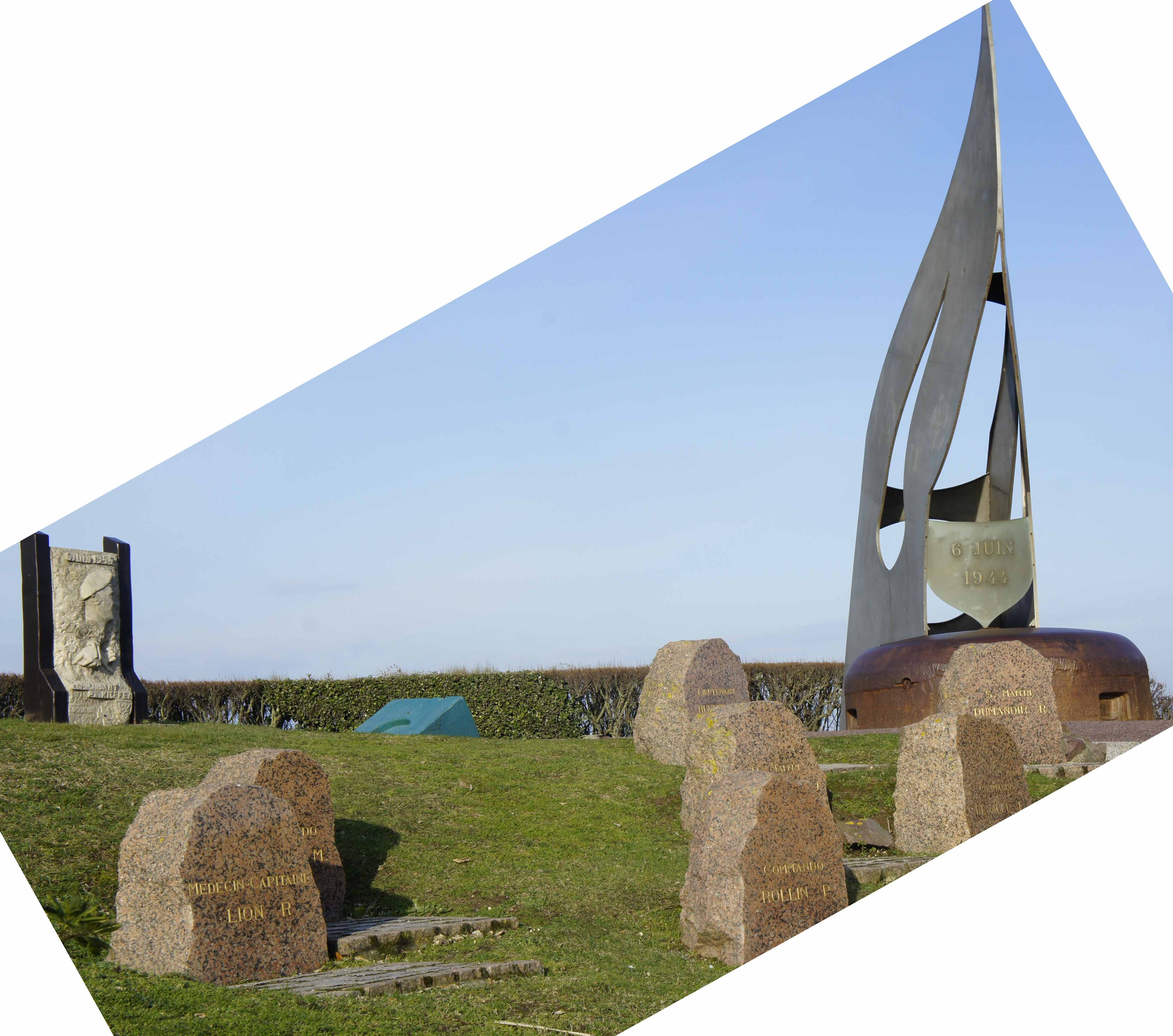 Monument en hommage aux membres du commando Kieffer tombé lors du débarquement.